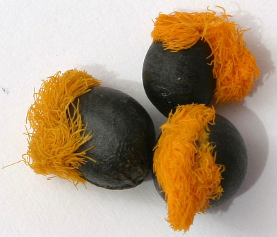 Samen der Paradiesvogelblume, Strelitzia reginae, Samendurchmesser ca. 7mm